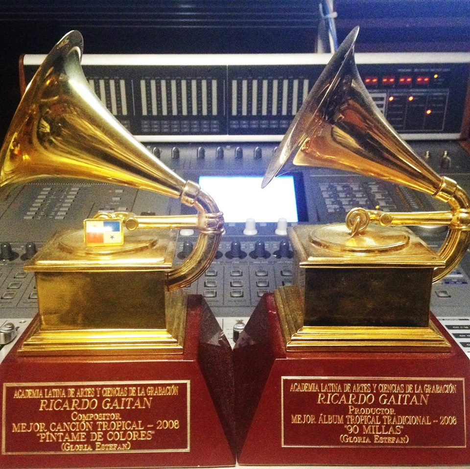 Premios recibidos en el 2008 en los Latin Grammy por Mejor Album Tropical Contemporaneo (90 Millas - Gloria Estefan) y mejor canción tropical (Pintame de Colores - Gloria Estefan), compositores: Ricardo Gaitan, Alberto Gaitan, Gloria Estefan, Emilio Estefan.